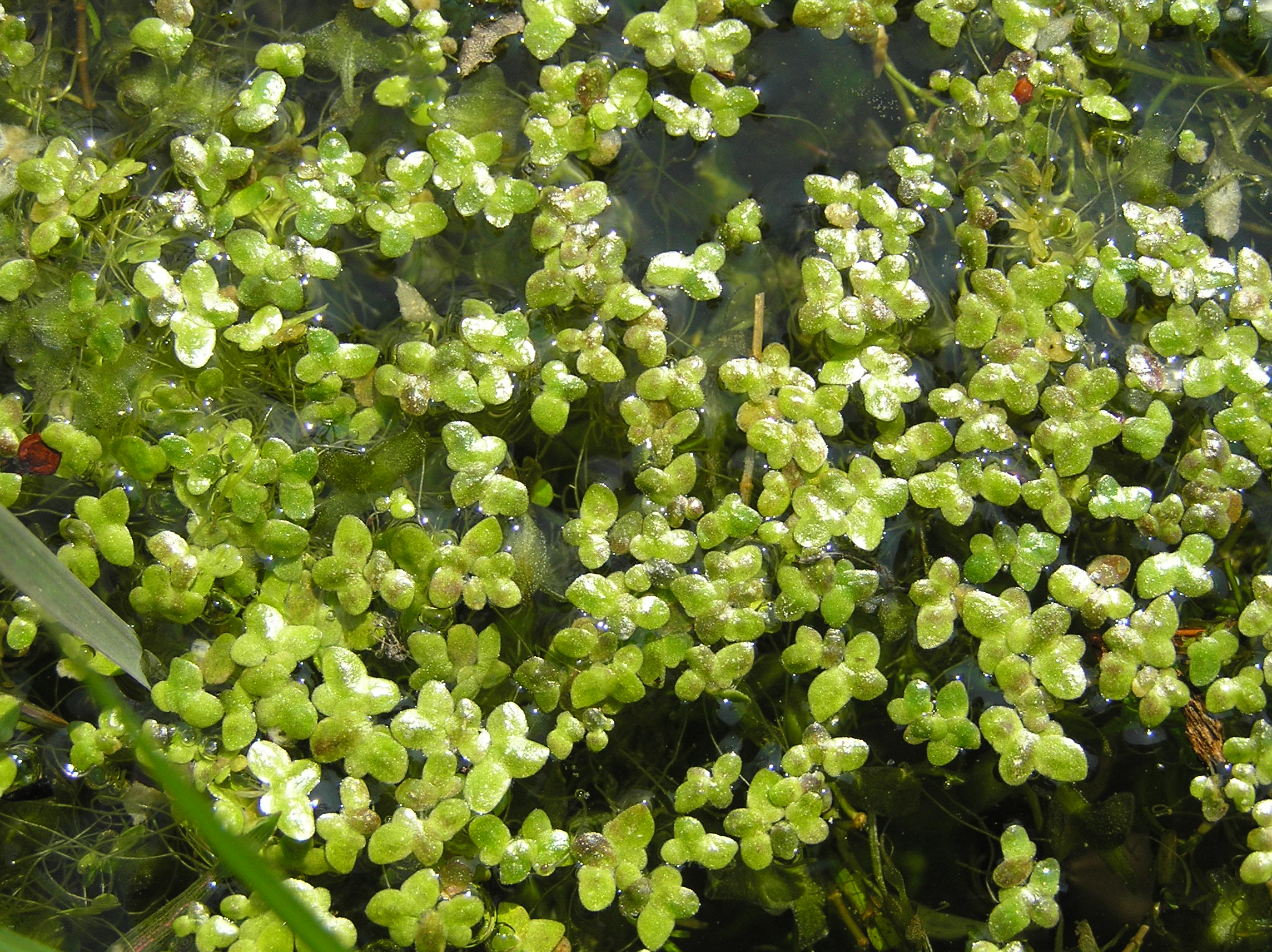 Lemna turionifera, Choceň, Czech Republic